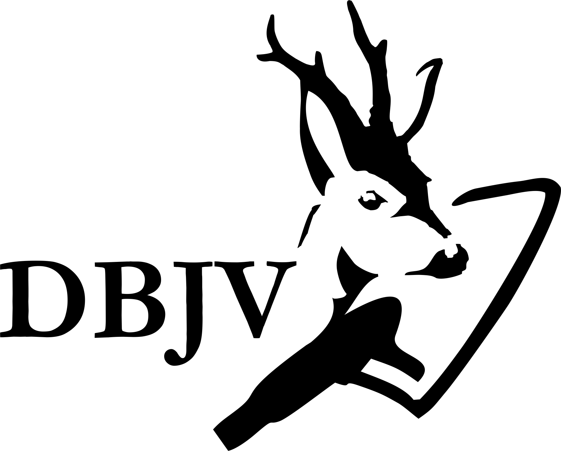 Logo DBJV